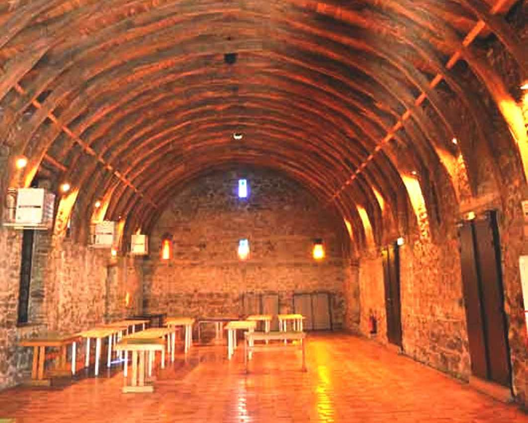 Davézieux Halle des Muletiers